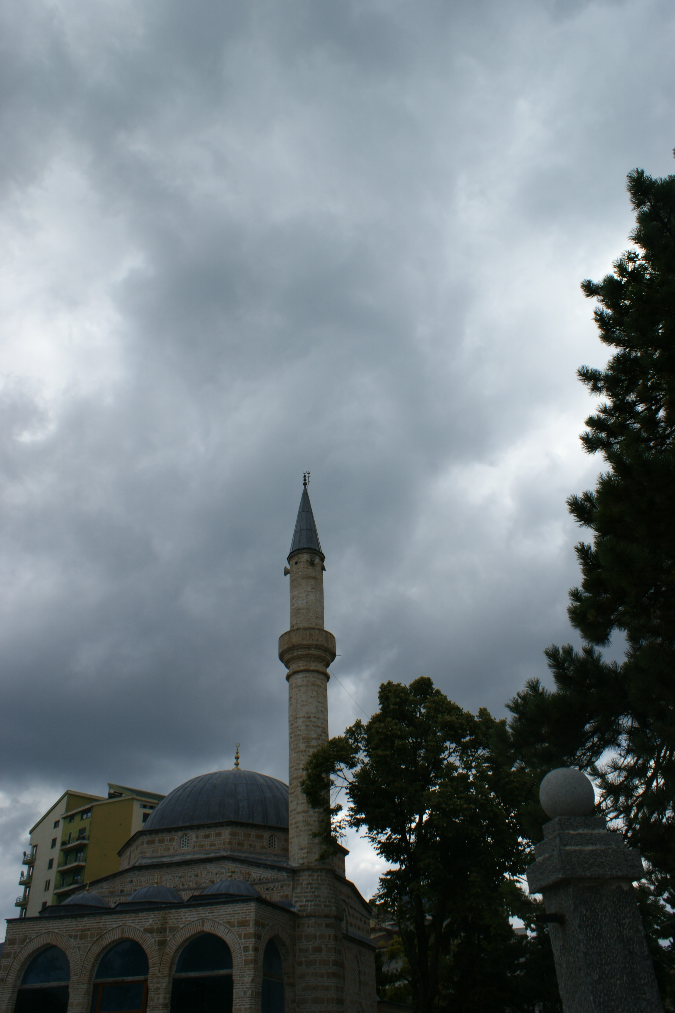 Xhamia e Iljaz Mihrahorit